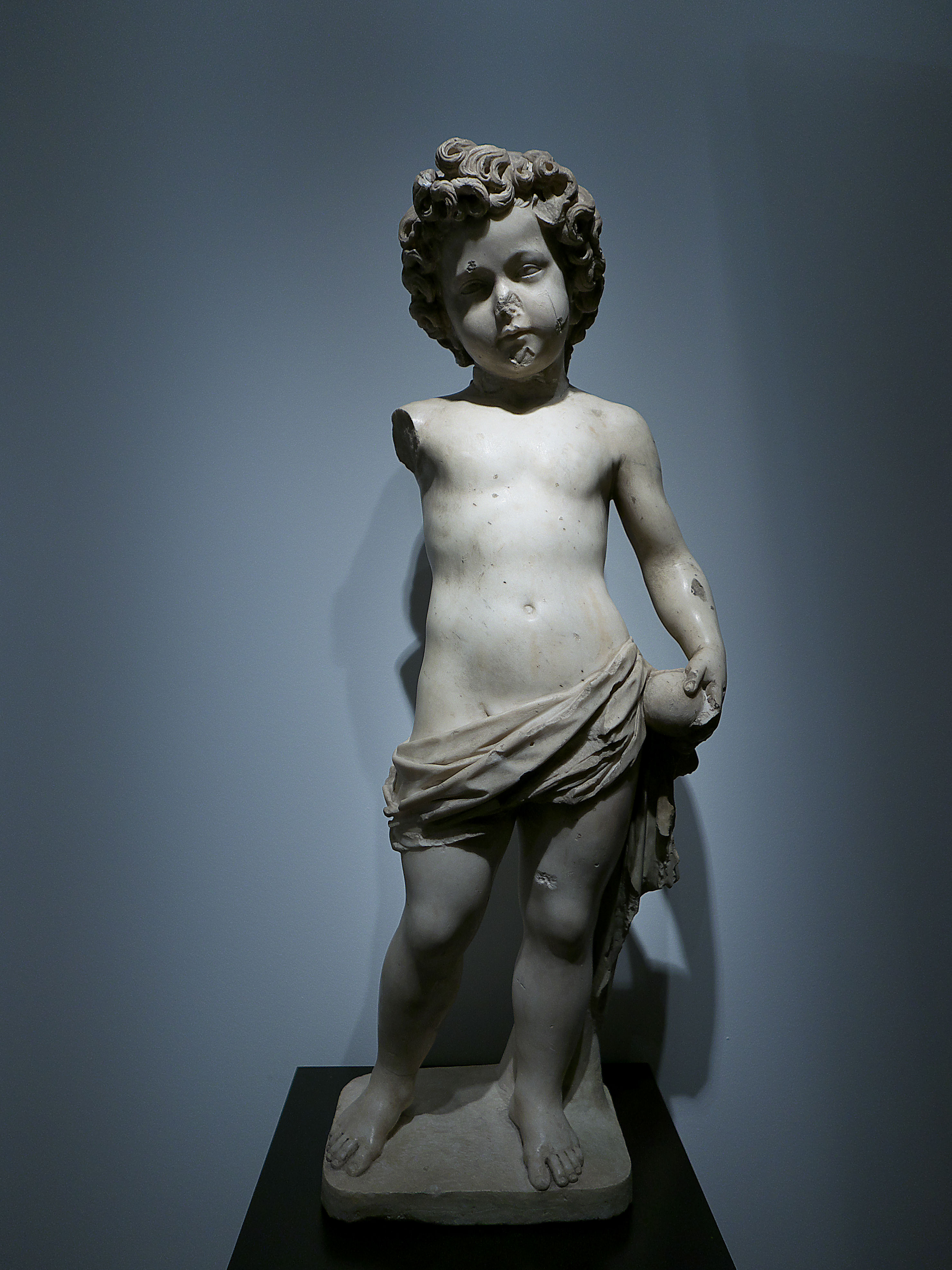 Museo de Burgos. Escultura tallada en mármol blanco (1570) por Michelangelo Naccherino para el Convento de San Pablo (Burgos)